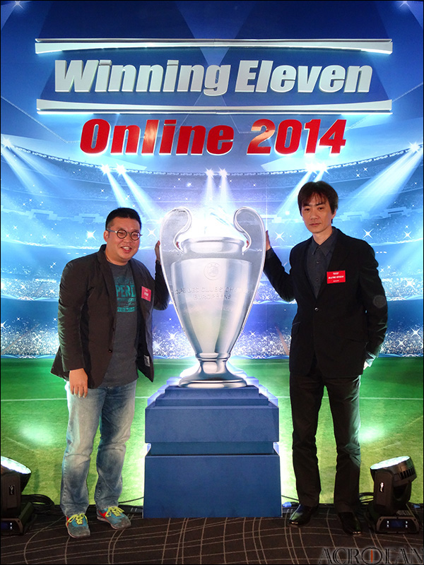 코나미 위닝일레븐 온라인 2014 신작 발표회